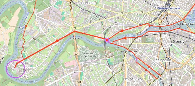 Services industriels de Genève : carte des principaux collecteurs des eaux usées de Genève avec position de la station d’épuration des eaux usées d’Aïre (à gauche) et de la station de pompage de Saint-Jean (au centre). Le collecteur entre ces deux installations est haut de 3,950 m et large de 3,250 m. Le collecteur venant de Vernier fait 1,5 m de diamètre. Le collecteur rive droite du Rhône est haut de 2,6 m, celui sur la rive gauche 2,2 m, sur la rive droite de l'Arve 2,5 m et sa rive gauche 2 m. Les siphons passant sous le Rhône et sous l'Arve sont formés de trois tubes chacun. Ces installations ont été construites en 1966-1967, conséquence de la loi genevoise sur les eaux du 5 juillet 1961, adoptée en application de la loi fédérale adoptée le 15 mai 1955 (voir Yves Maystre, Journal de Genève, 28 sept. 1967).